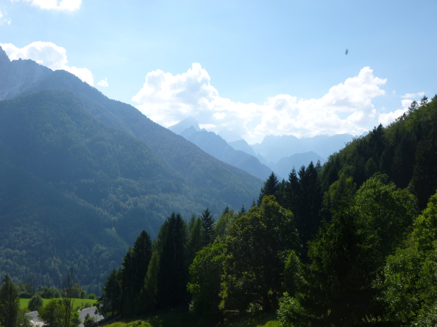 23 Blick von Srednji Vrh nach Westen